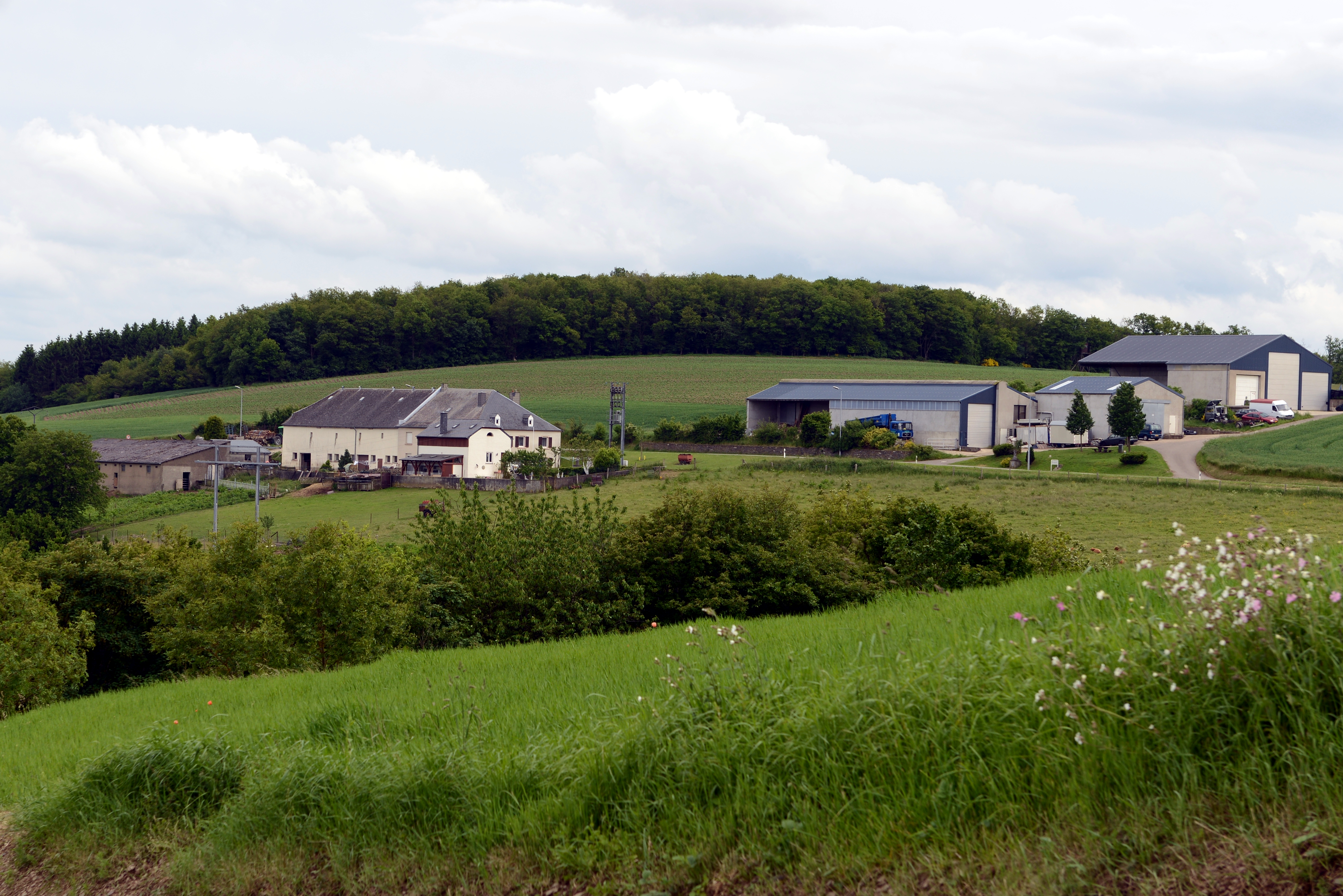 De Konerhaff zu Alschent.